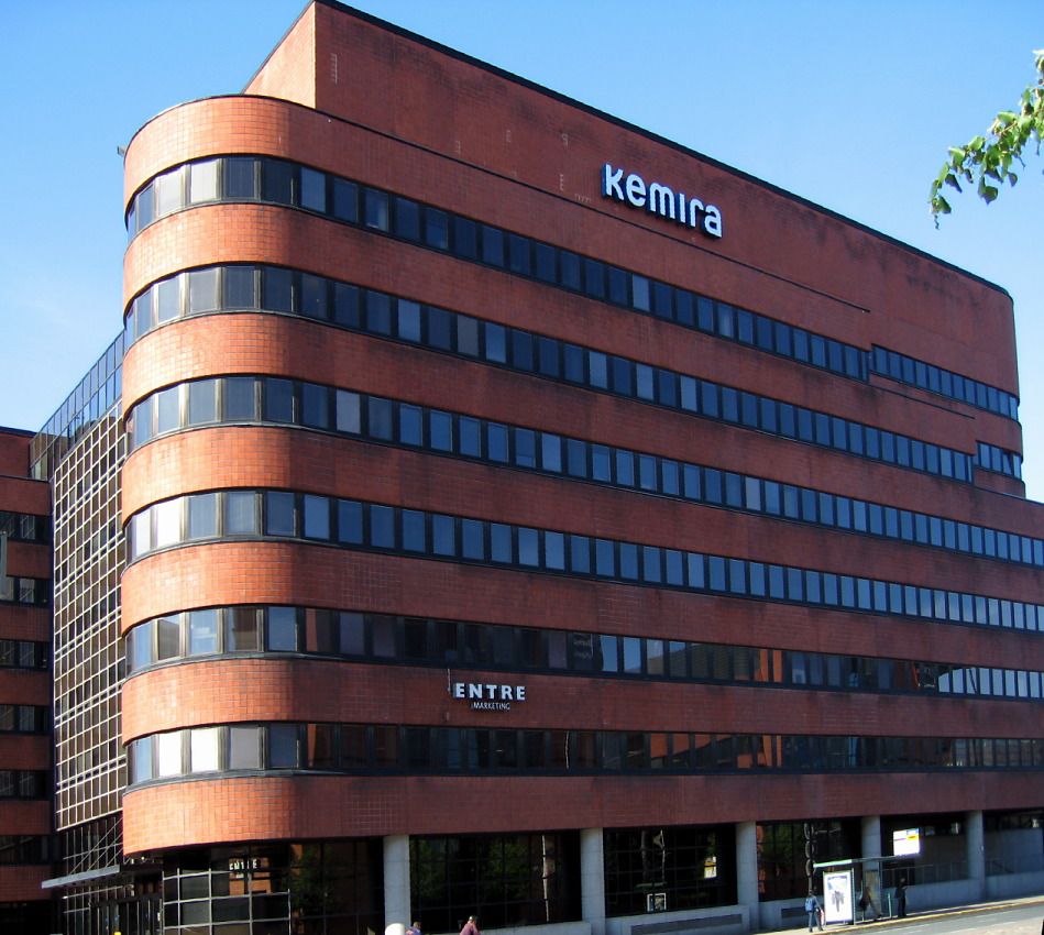 Kemiran pääkonttori Helsingin Ruoholahdessa.